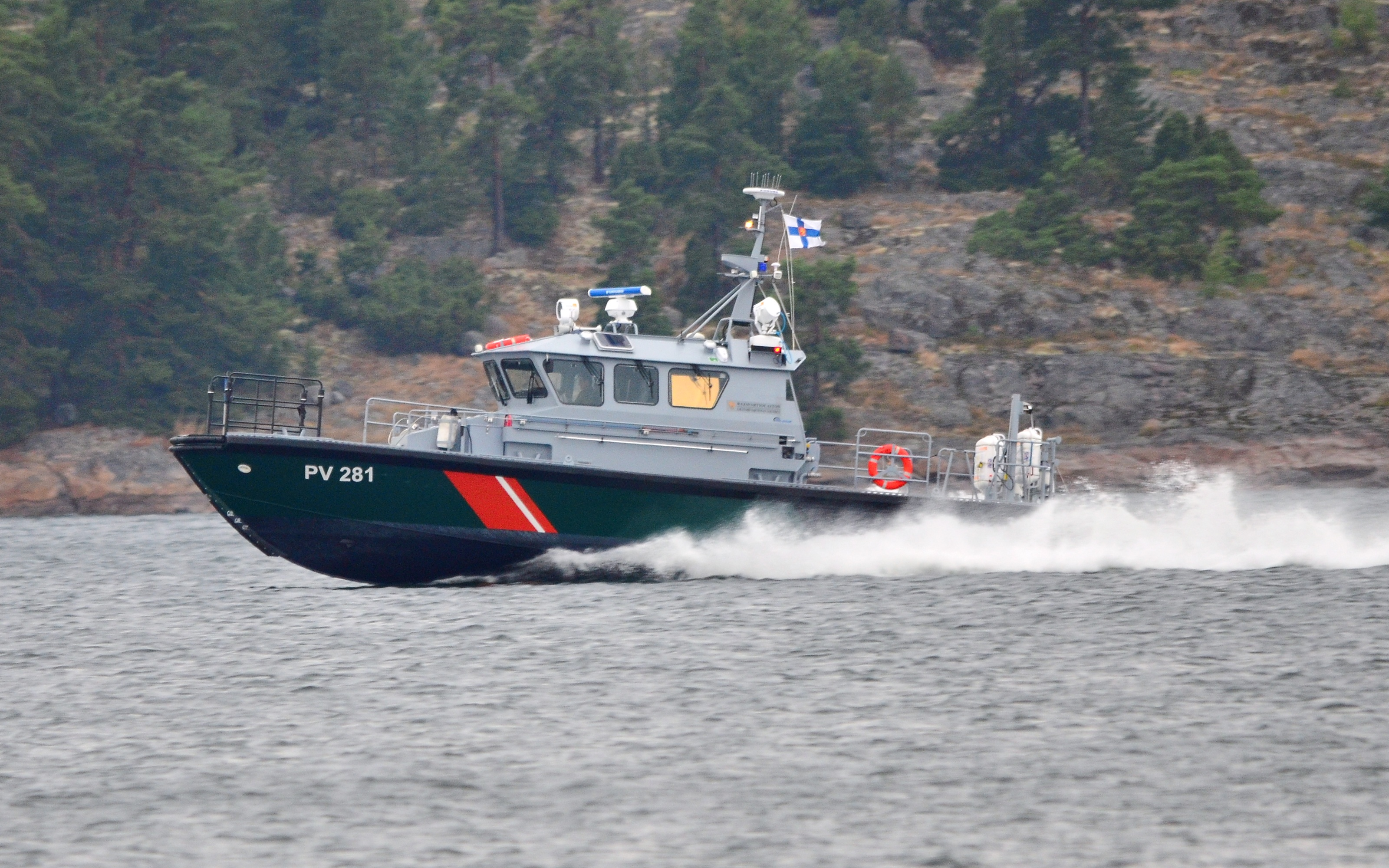 Sjöbevakningens patrullbåt PV 281 vid Högsåra, Finland.